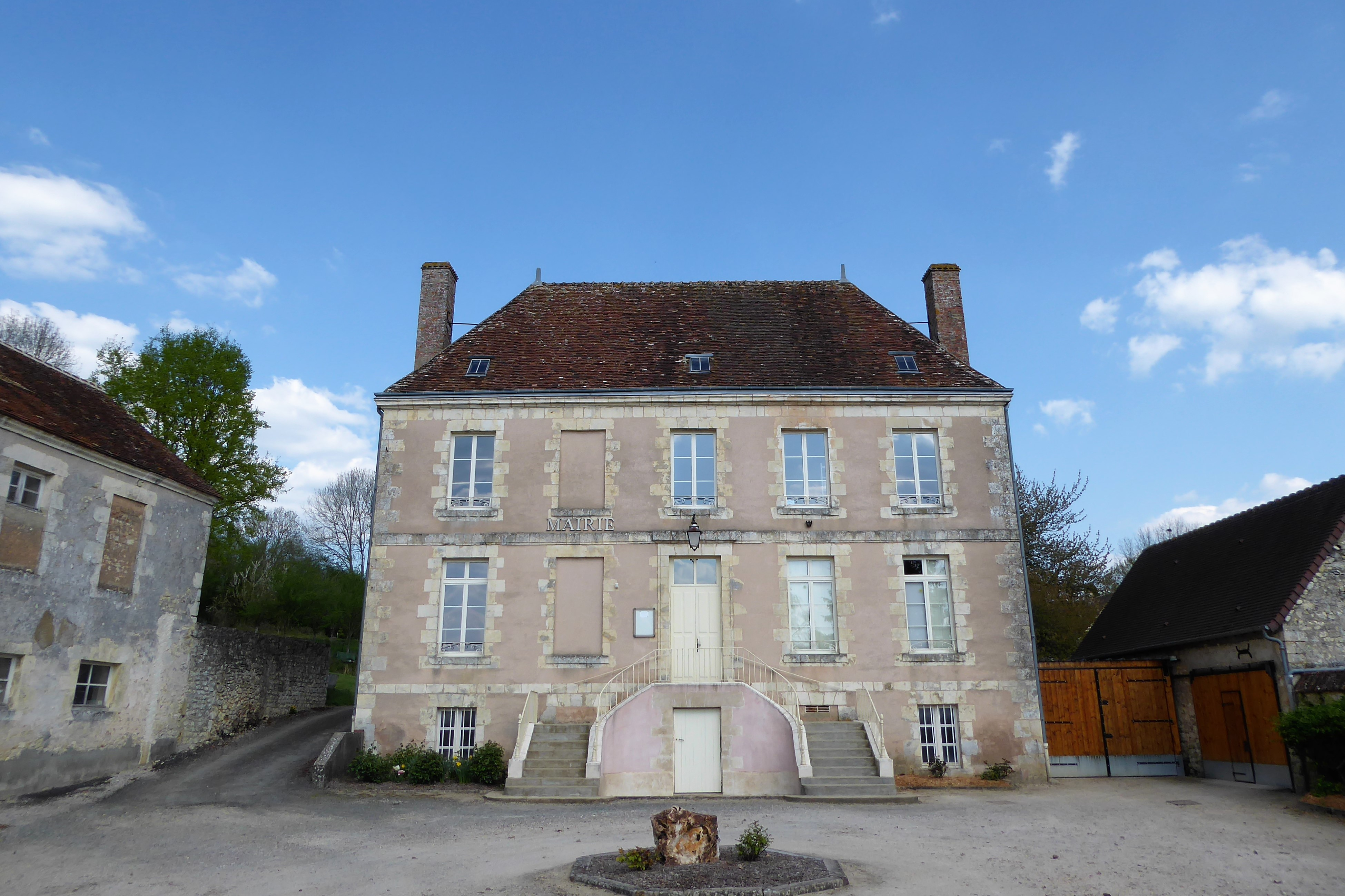 mairie de Souancé-au-Perche, Eure-et-Loir, France.